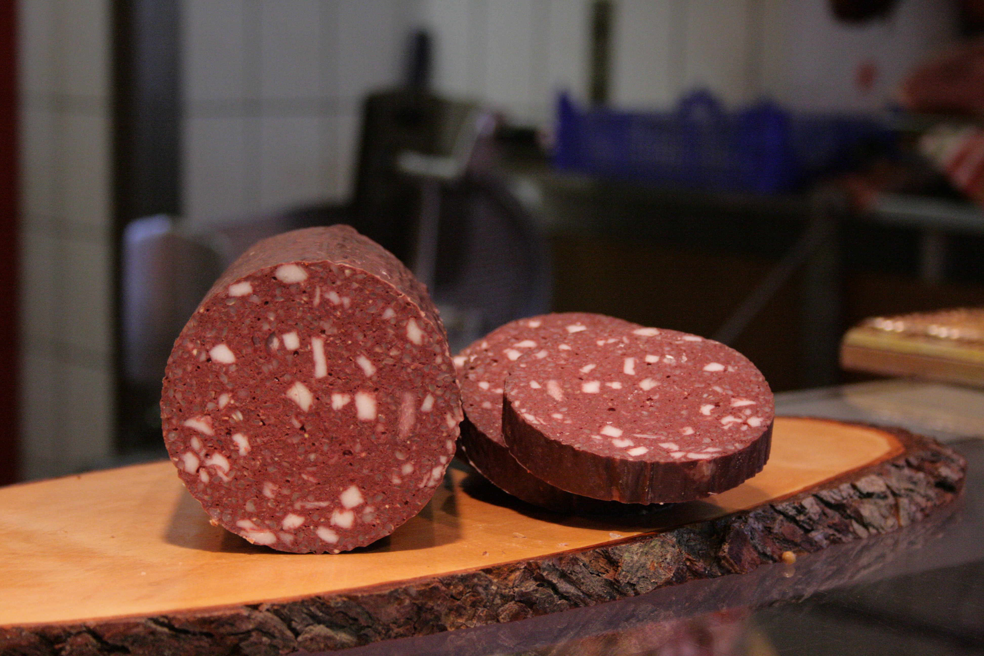 Wurstebrot in der Metzgerei (Metzgerei Klaus, Versmold) vorm Braten